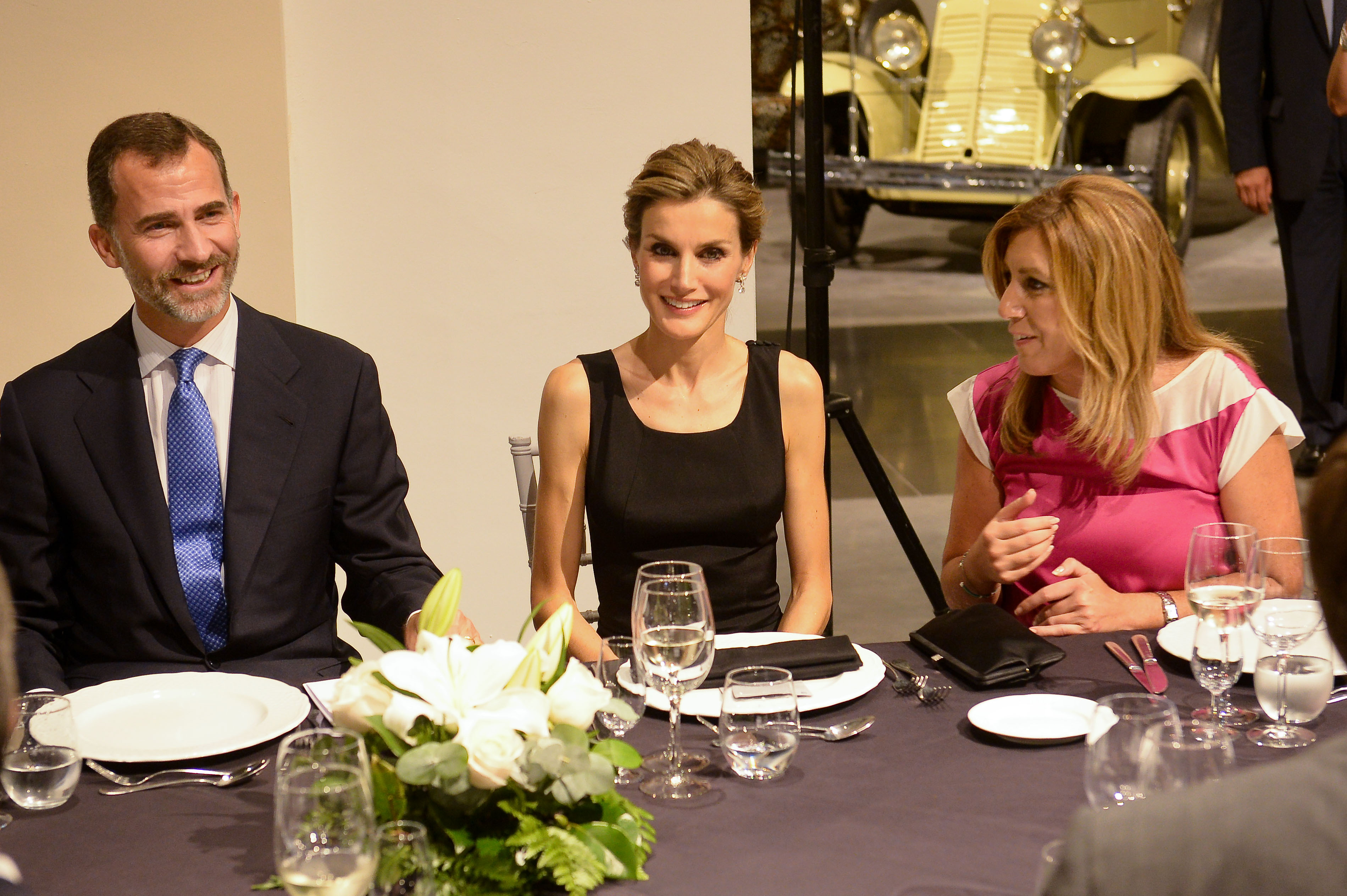 14.09.05-Foro-4- España-EEUU-Malaga